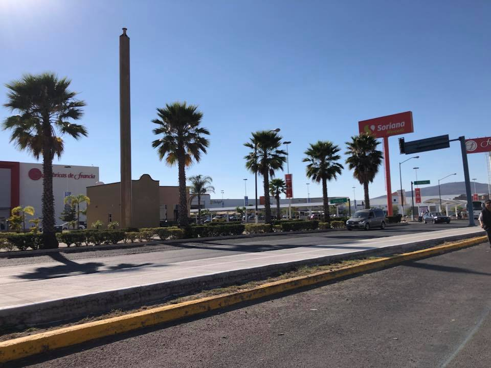 Centro Comercial Galerías Metropolitana Uriangato